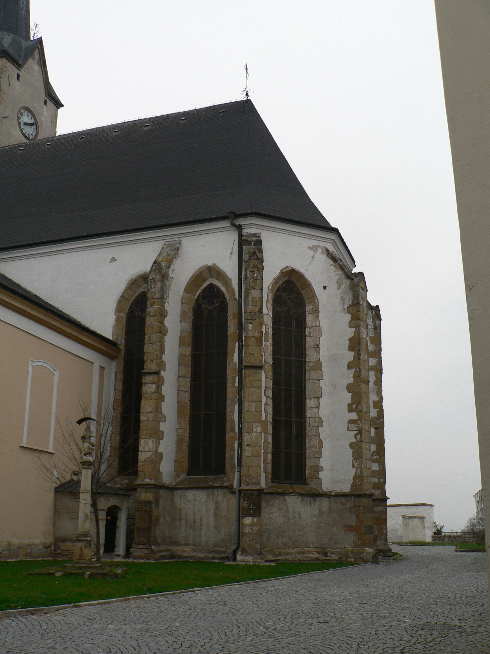 Kostel svatého Tomáše z Canterbury (Mohelnice)